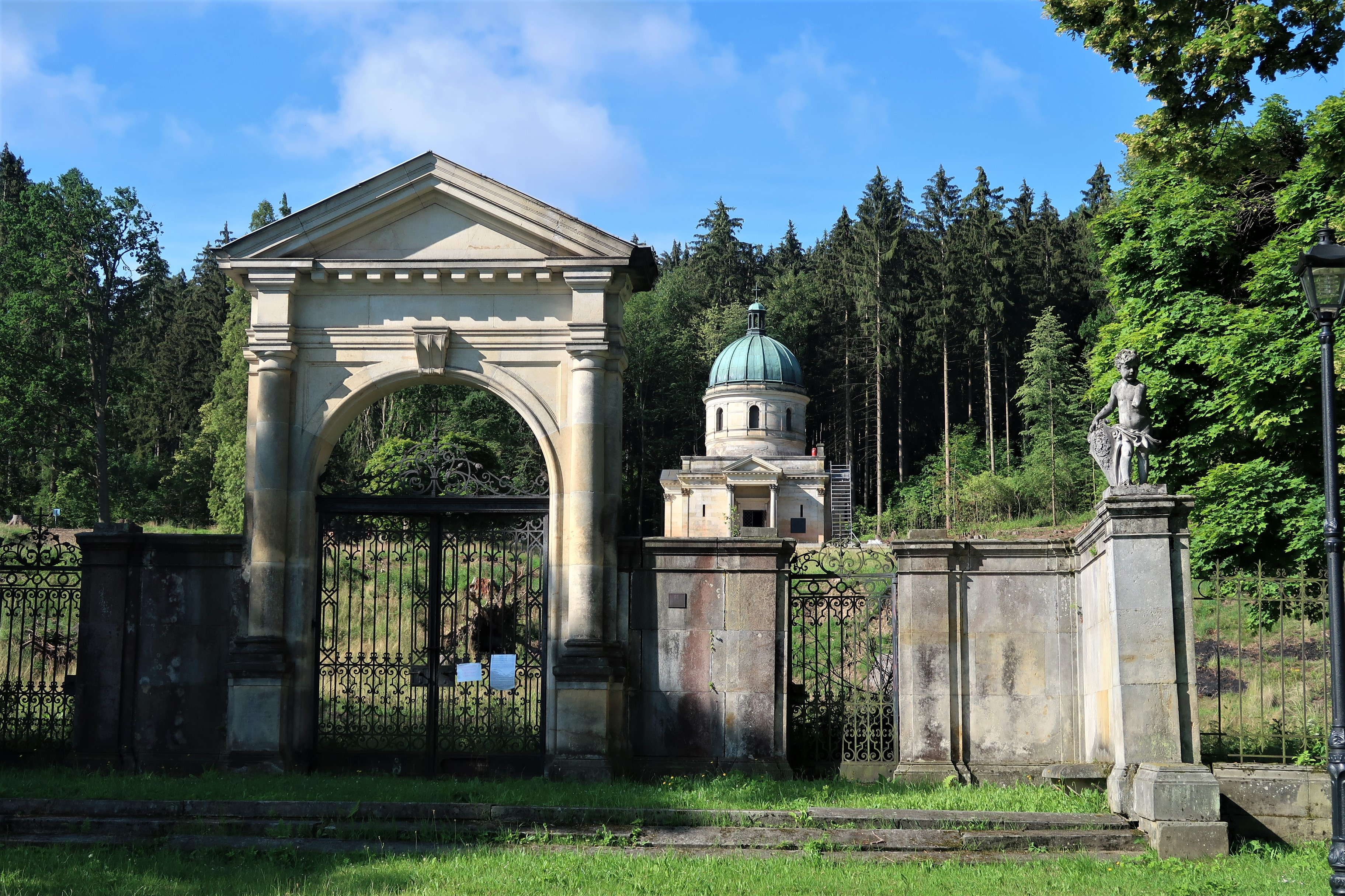 Celkový pohled na mauzoleum rodiny Kleinů se vstupní branou (Sobotín)